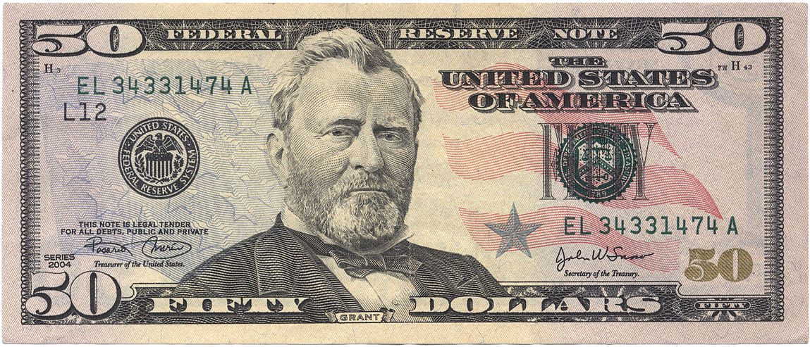 US 50 dollar bill obverse, series 2004